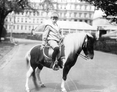 Archie Roosevelt, son of US president Theodore Roosevelt, with Algonquin the pony, 1902